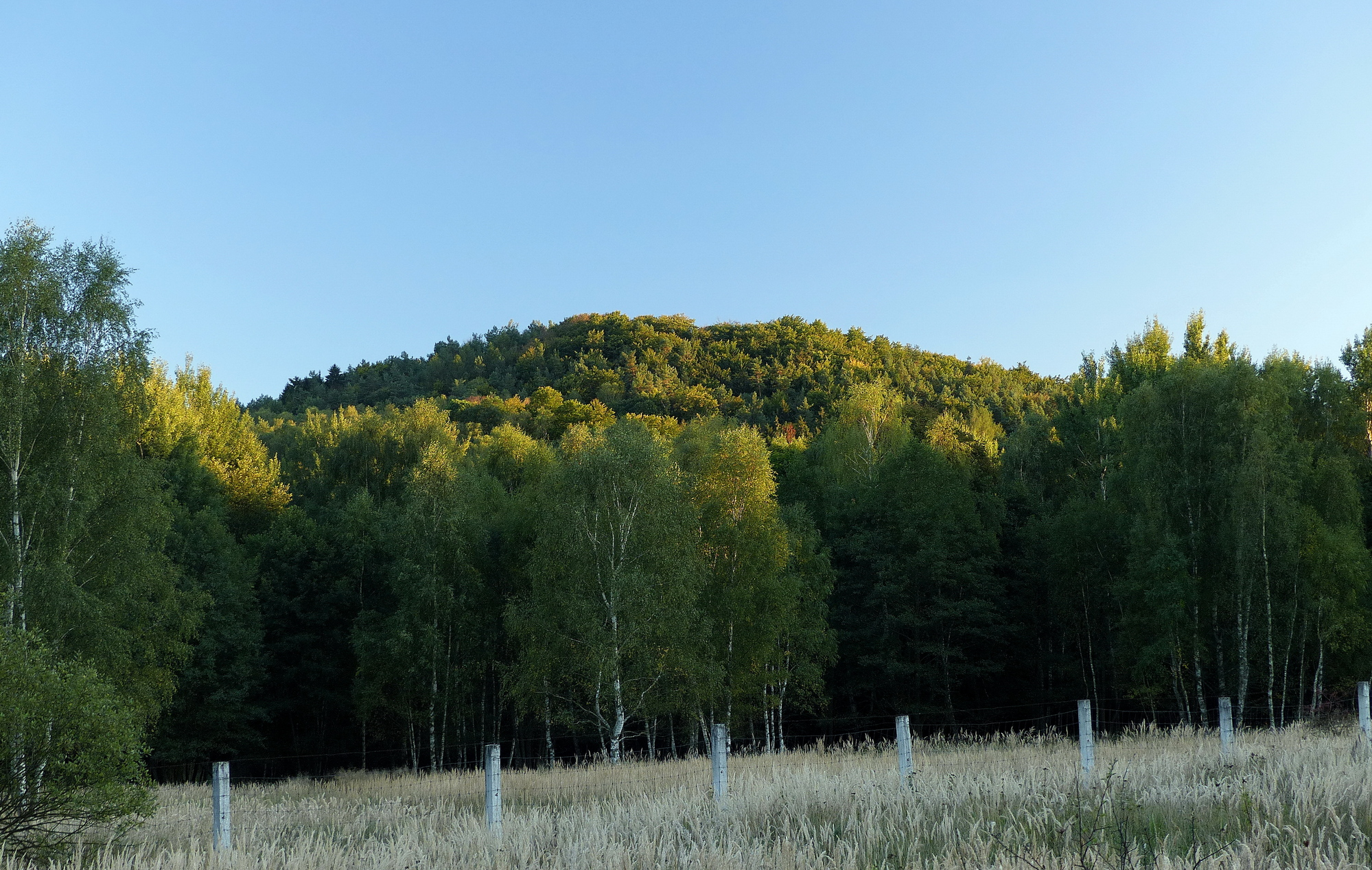 Brada od severu, za plotem obory Židlov.